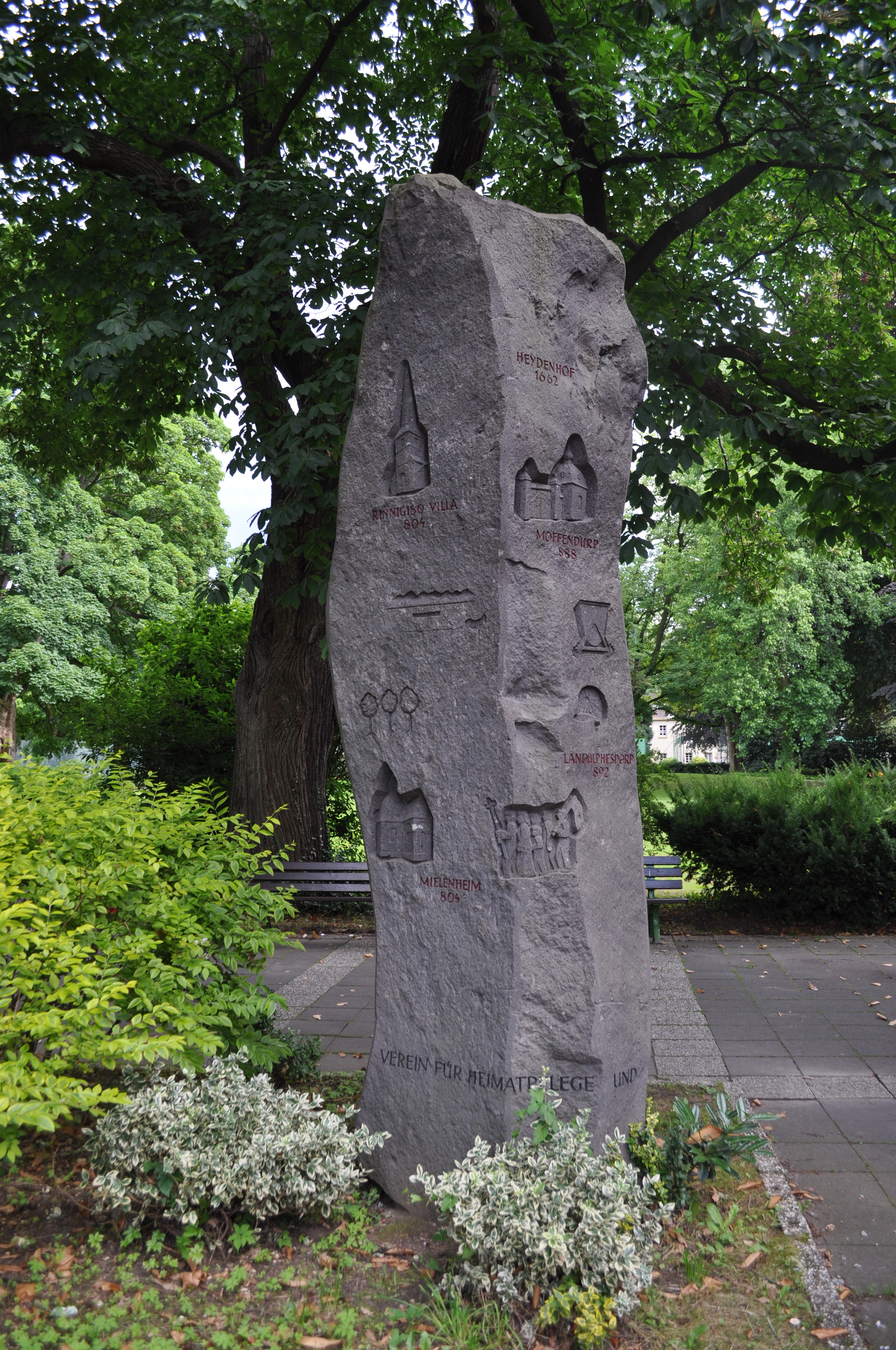 Bildsäule (2005) des Vereins für Heimatpflege und Heimatgeschichte Bad Godesberg im Stadtpark von Bad Godesberg